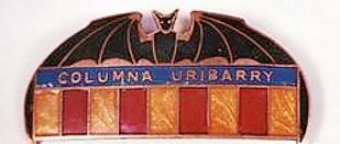 Logotip de la Columna Uribarri (de vegades escrit erròniament Uribarry).